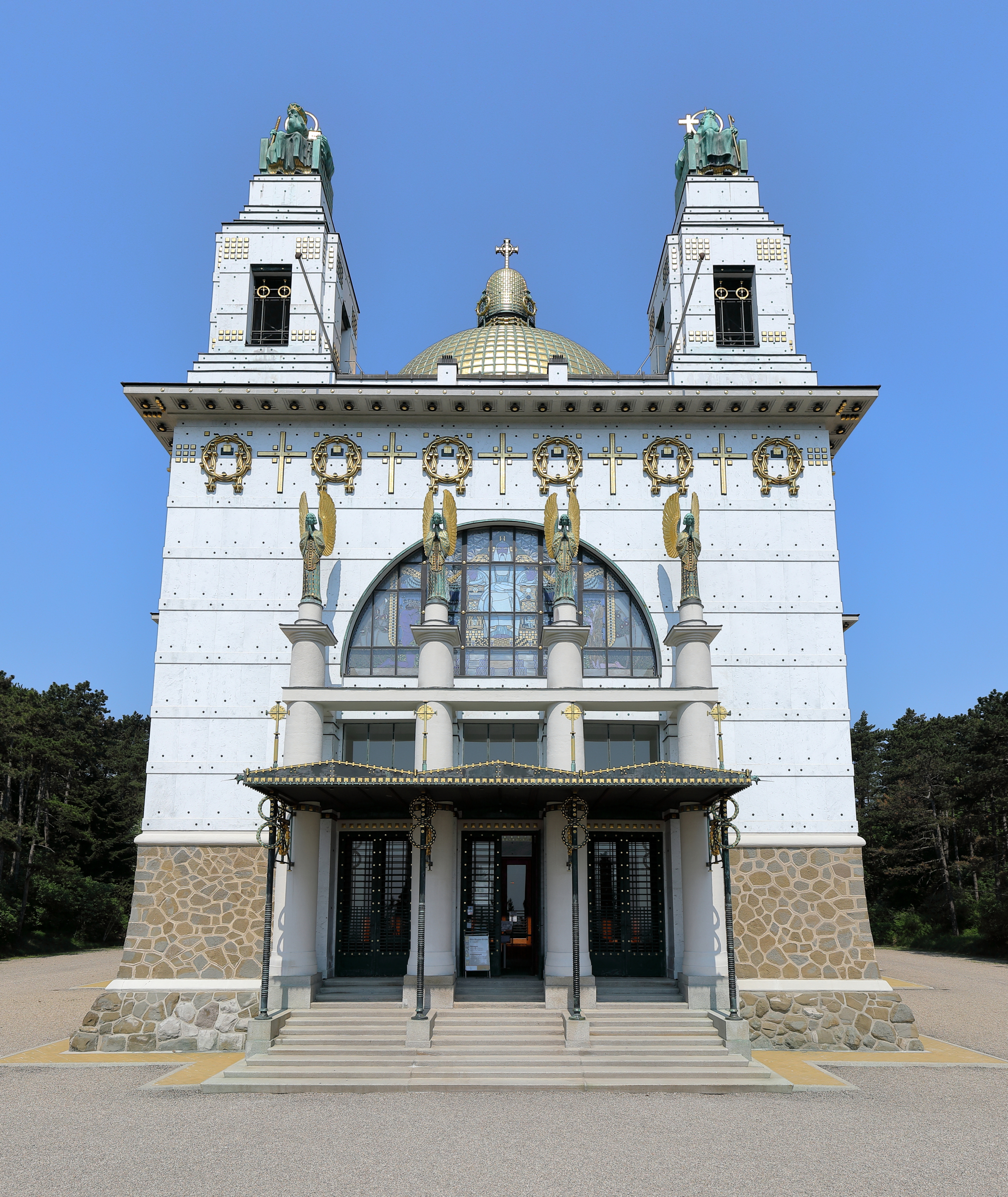 Hauptfassade bzw. Südansicht der Kirche am Steinhof, auch Leopoldskirche bezeichnet, auf dem Gelände des „Sozialmedizinischen Zentrums Baumgartner Höhe“ im 14. Wiener Gemeindebezirk Penzing und das Leopold-Steiner-Denkmal.Die Kirche wurde von 1904 bis 1907 über dem traditionellen Grundriss eines griechischen Kreuzes nach Plänen des Architekten Otto Wagner als Anstaltskirche errichtet. Sie ist der bedeutendste Sakralbau der Wiener Moderne in Wien.